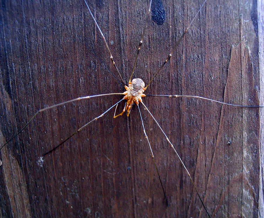 Weberknecht - Kanker - Phalangium opilio (Männchen)